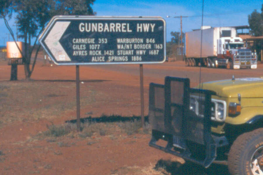 De Gunbarrel Highway nabij Wiluna.